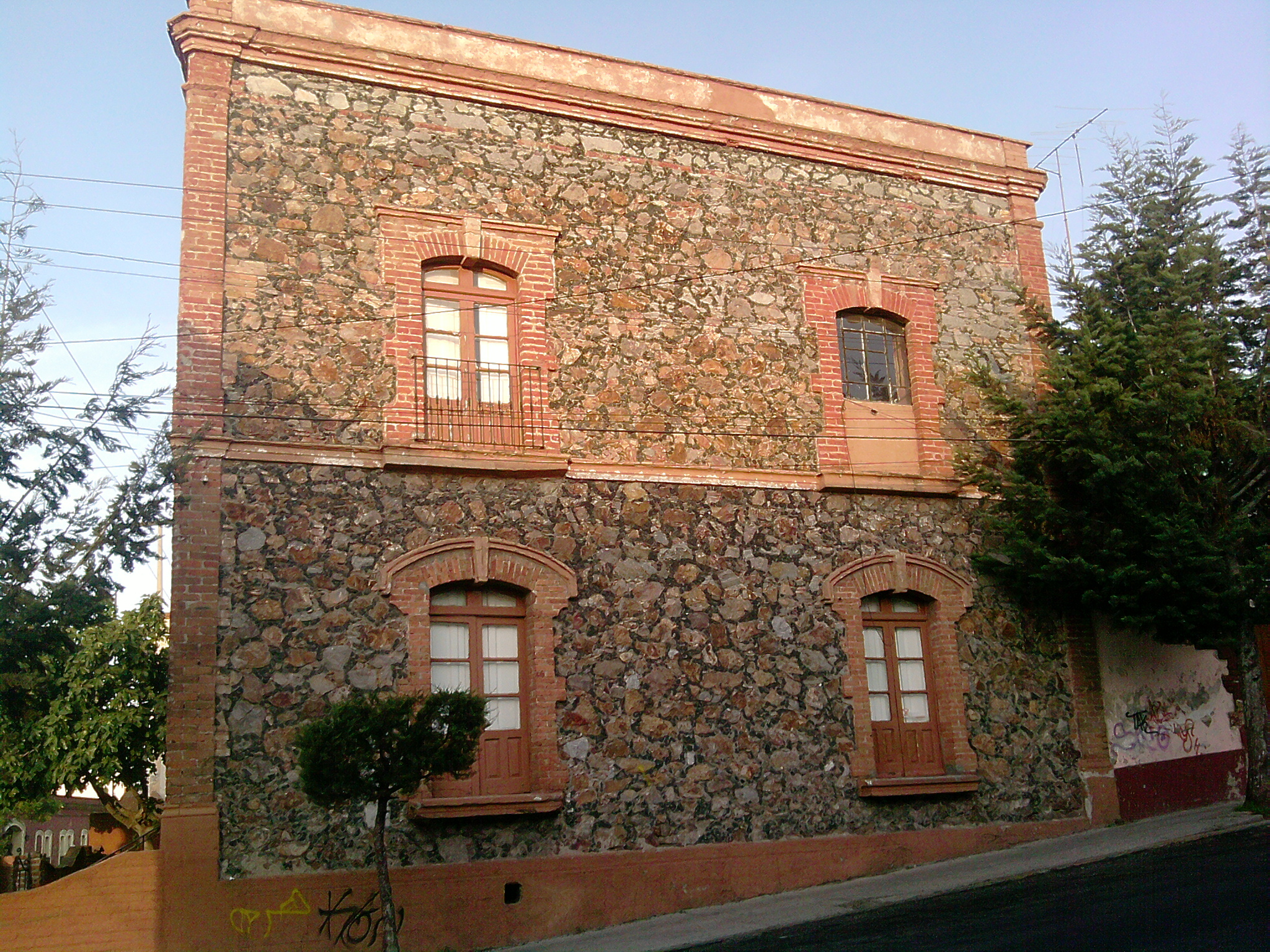 Casa de Propiedad Federal